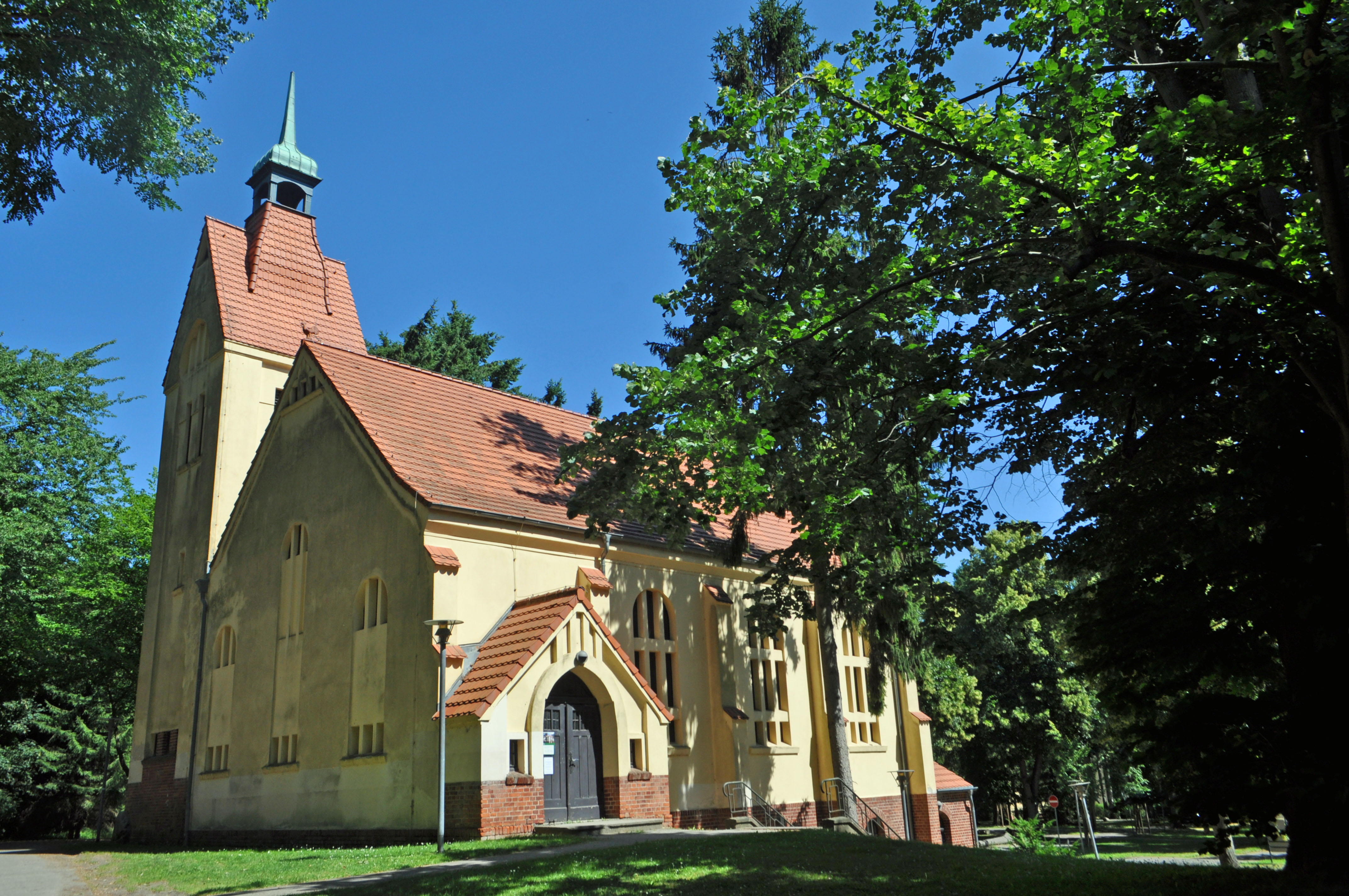 Auf dem Gelände des Krankenhauses "West" (HELIOS Hanseklinikum, West, Rostocker Chaussee 70, in Stralsund). Klinikumskirche Stralsund